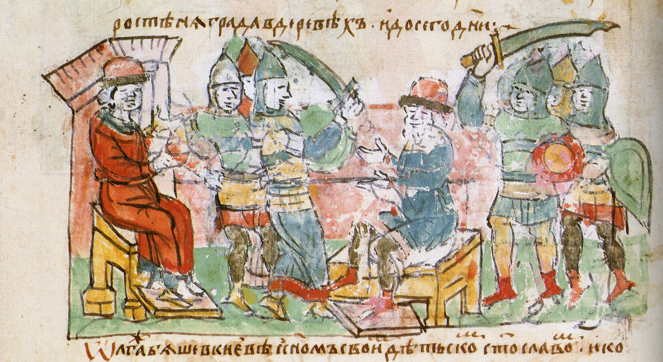 мініатюра з Радзивілівського літопису